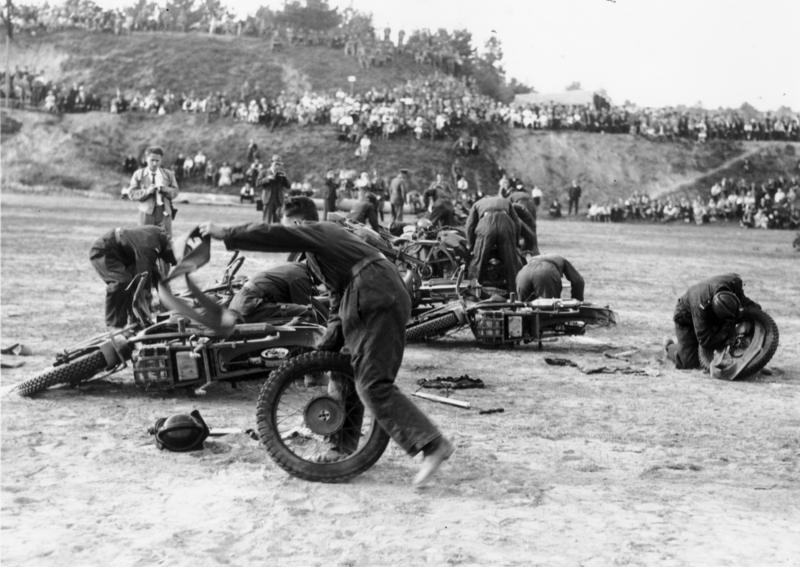 Sportfest des Kraftfahrlehrkommandos Zossen in Töpchin in Wünsdorf Gymkhana mit Krafträdern. Die Mannschaften müssen den Schlauch des Hinterrades auswechseln. 37845-34